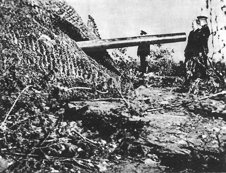 Zamaskowane stanowisko armaty Bofors kal. 152,4 mm 31. Baterii im. Heliodora Laskowskiego na Helu oglądane przez Niemców.